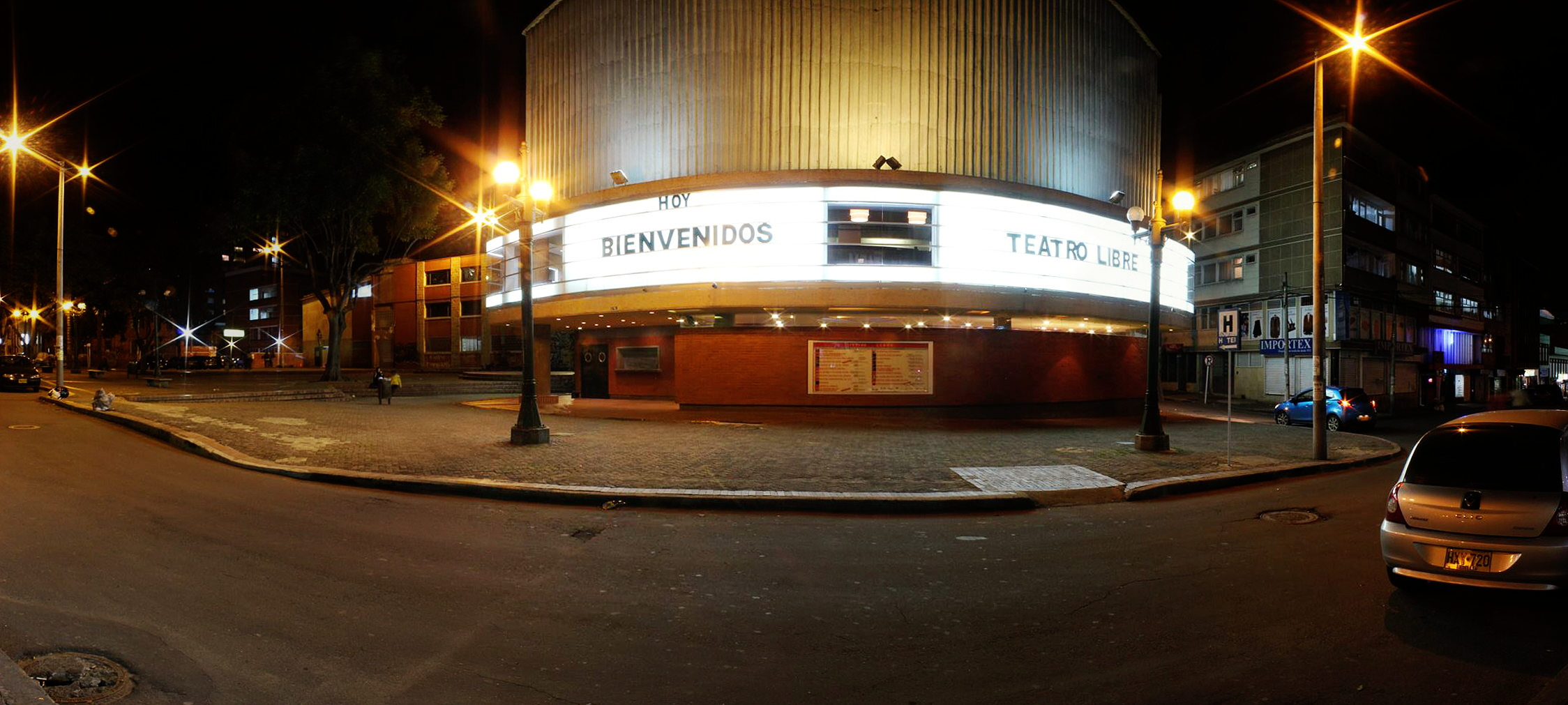 Teatro Libre Chapinero